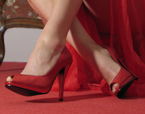 Rote Peeptoe-Highheels Genehmigung: Sonstiges: Freigabe unter unten genannten Lizenzbedingungen durch Frau Otilia Luther (Inhaberin der Urheberrechte)